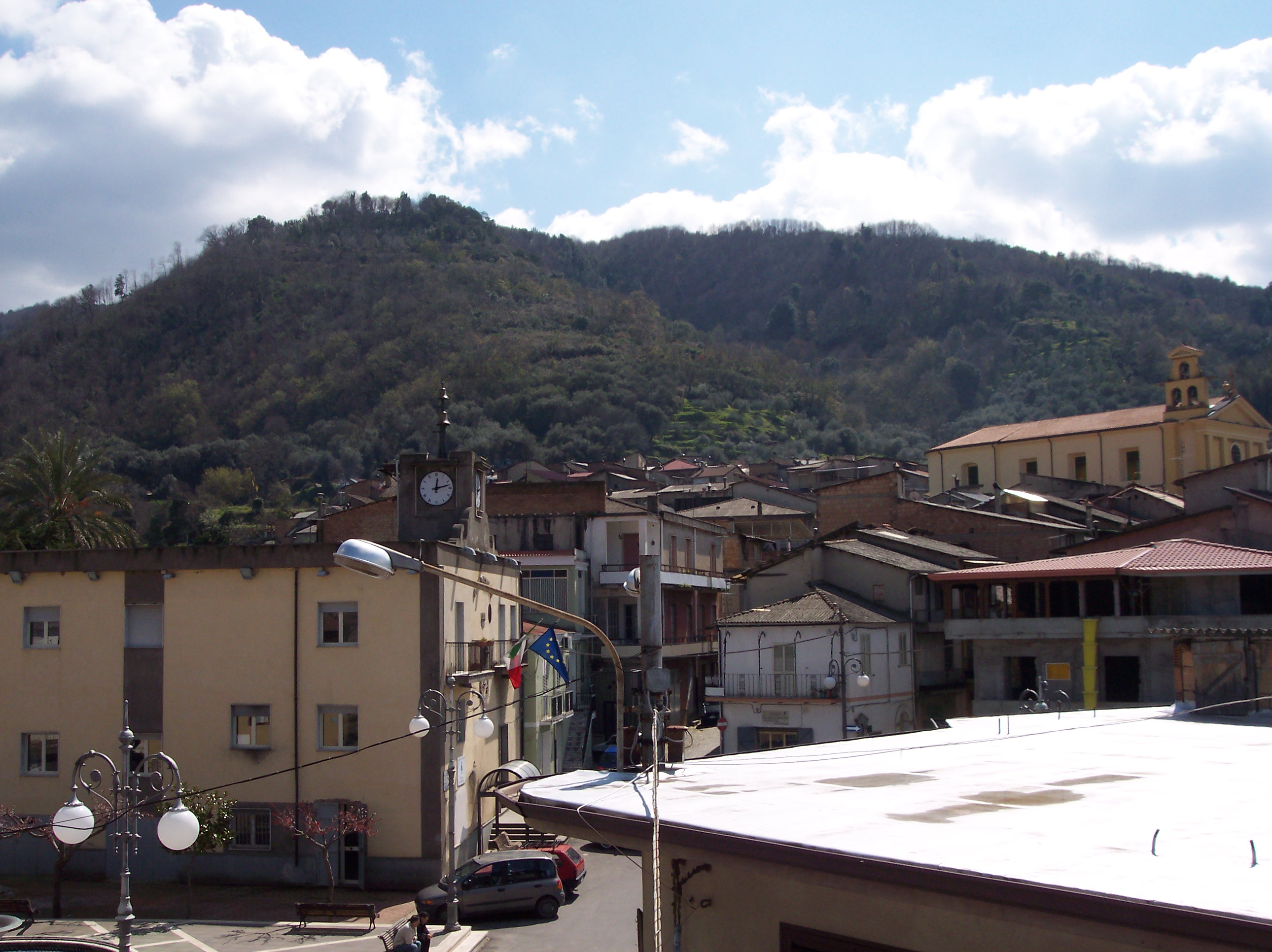 La piazza principale di Acquaro, con il Comune sulla sinistra e la parte vecchia del paese sullo sfondo.